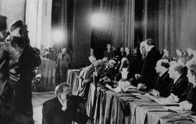 Berlin, Vereinigung KPD-SPD ADN-ZB-Archiv Vereinigungsparteitag, Der historische Händedruck, 1946 [Berlin, April 1946, Vereinigungsparteitag der KPD und der SPD zur SED, Händedruck zwischen Otto Grotewohl und Wilhelm Pieck, 2.v.r.: Erich Gniffke, 3.v.r.: Walter Ulbricht] Abgebildete Personen: Grotewohl, Otto: Ministerpräsident, stellvertretender Staatsratsvorsitzender, DDR Pieck, Wilhelm: Präsident, Politbüro der SED, Vorsitzender der KPD, DDR